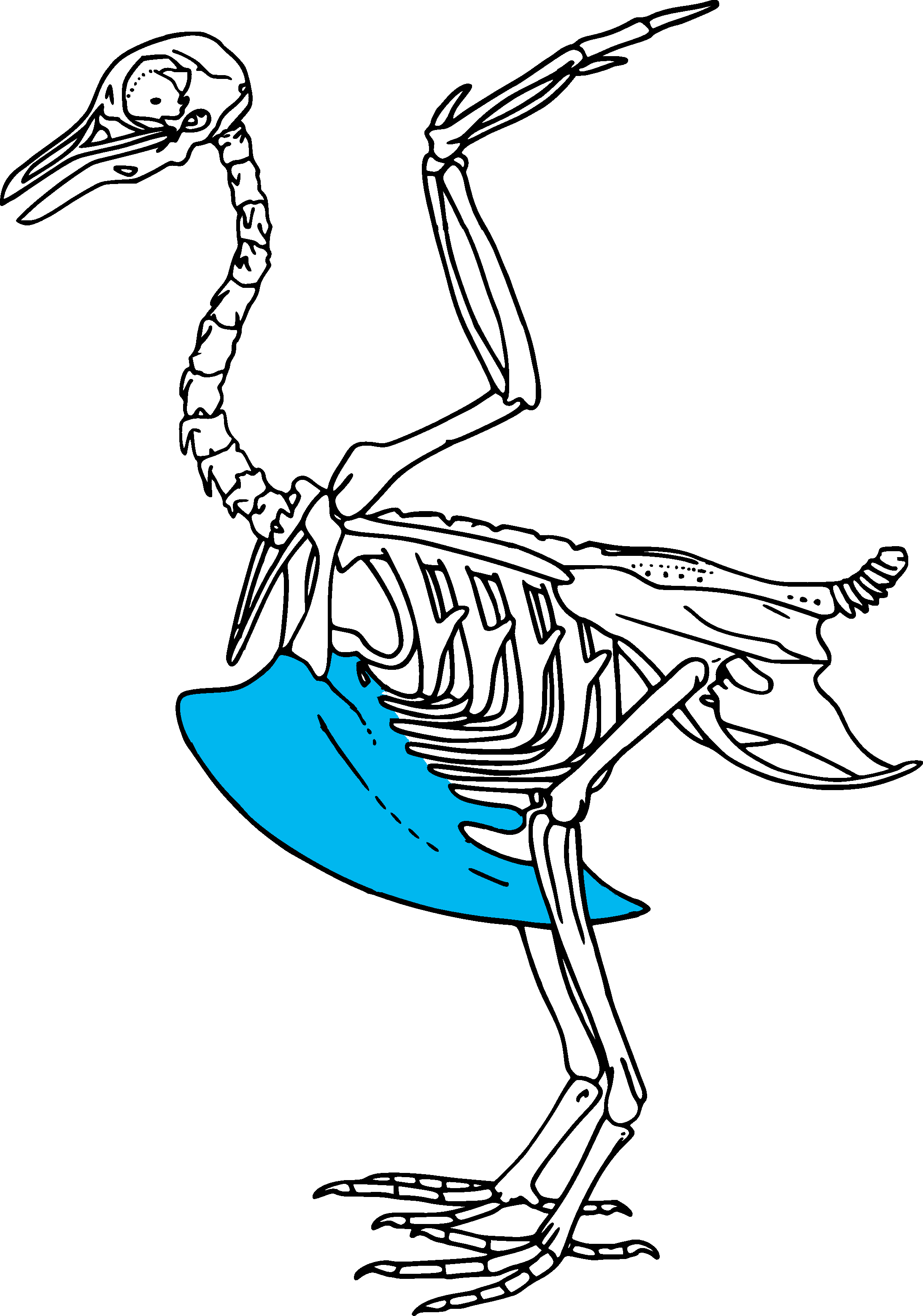 Bréchet, keel sternum